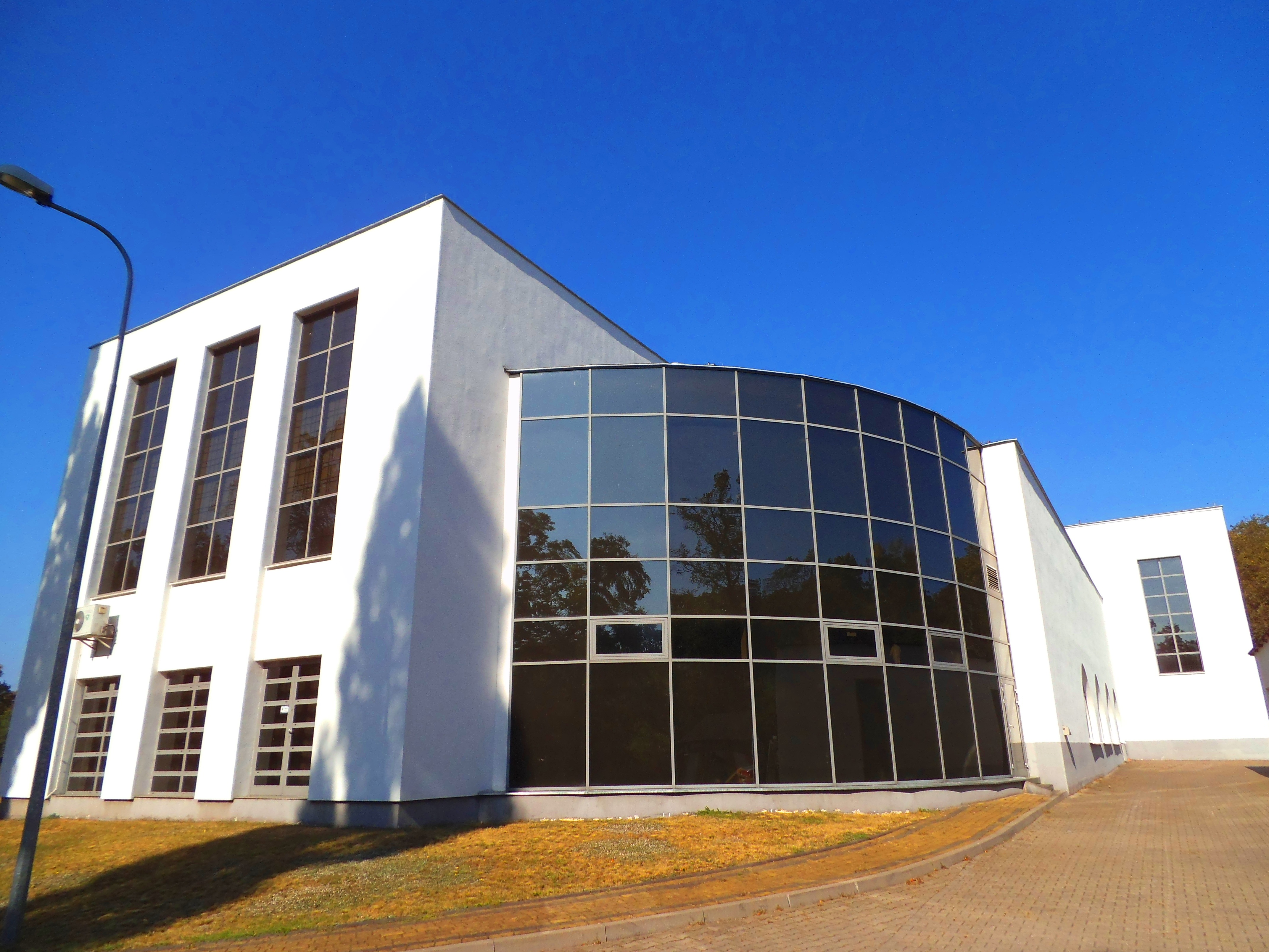 Hala wystawowa w Toruniu